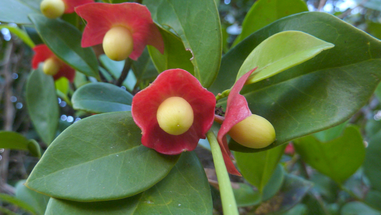 Heisteria perianthomega (Vell.) Sleumer